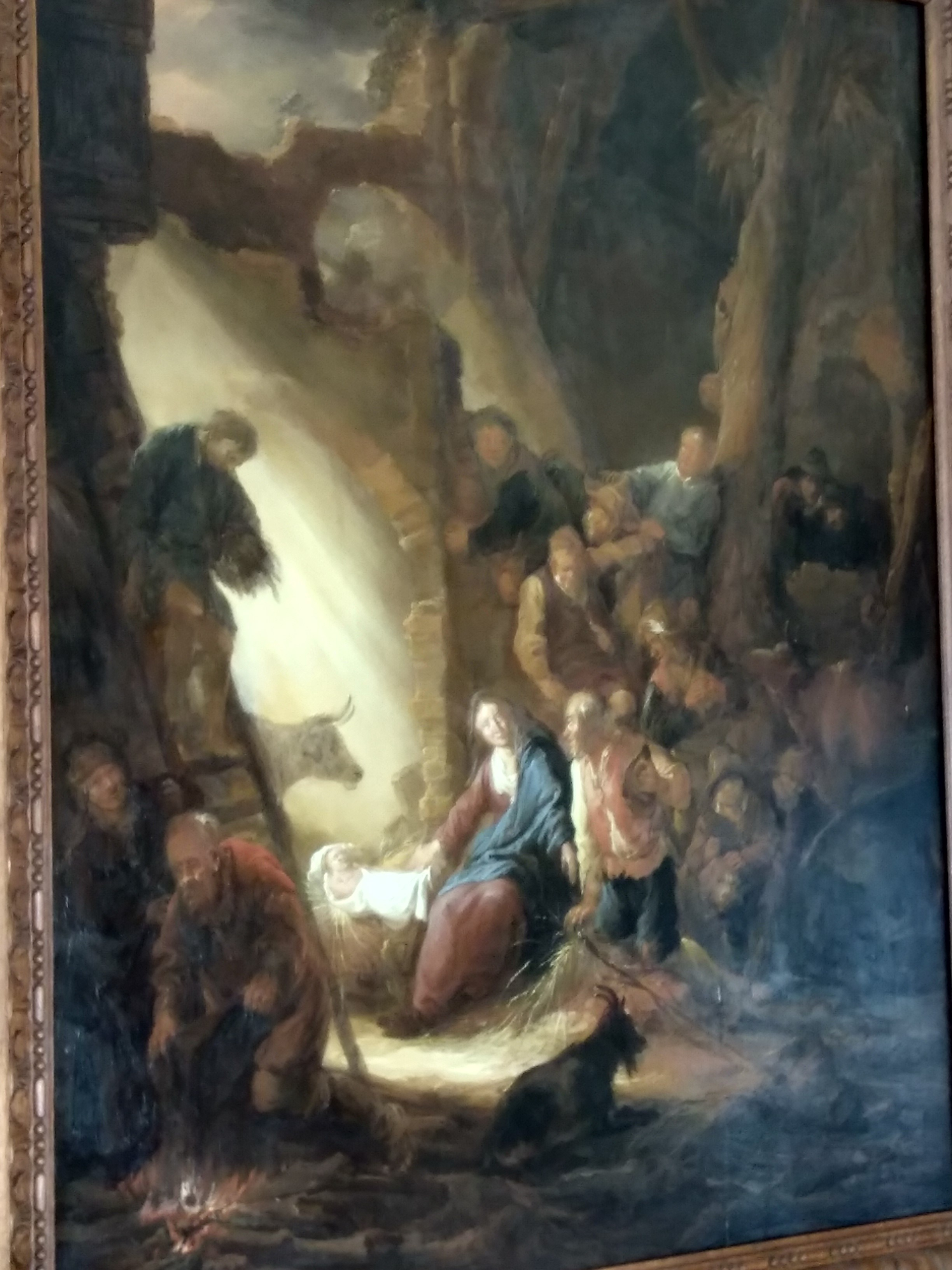 Nativité, paire de tableaux avec Mise au tombeau